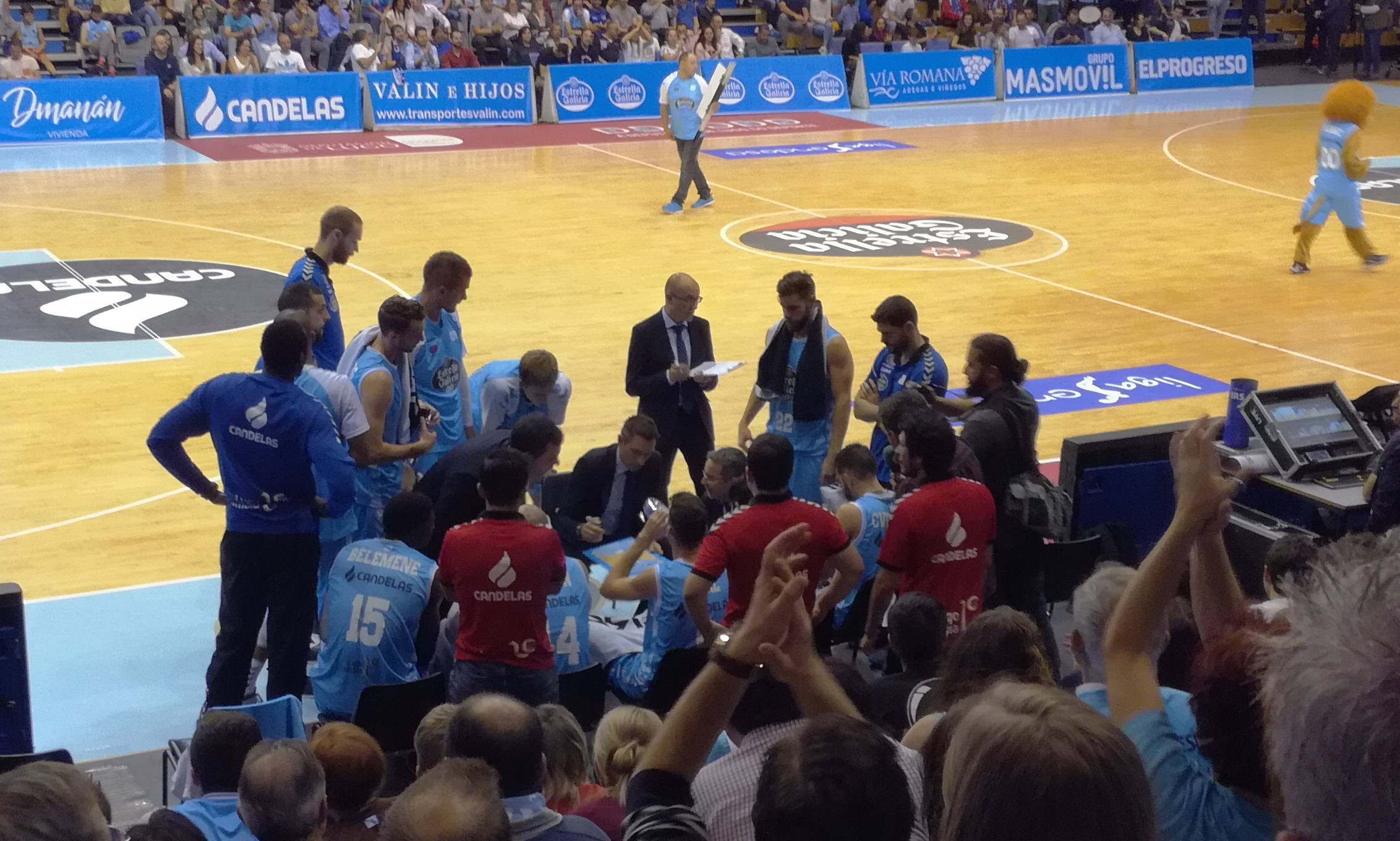 Imaxe do xogo entre o CB Breogán e o CB Estudiantes da Liga ACB